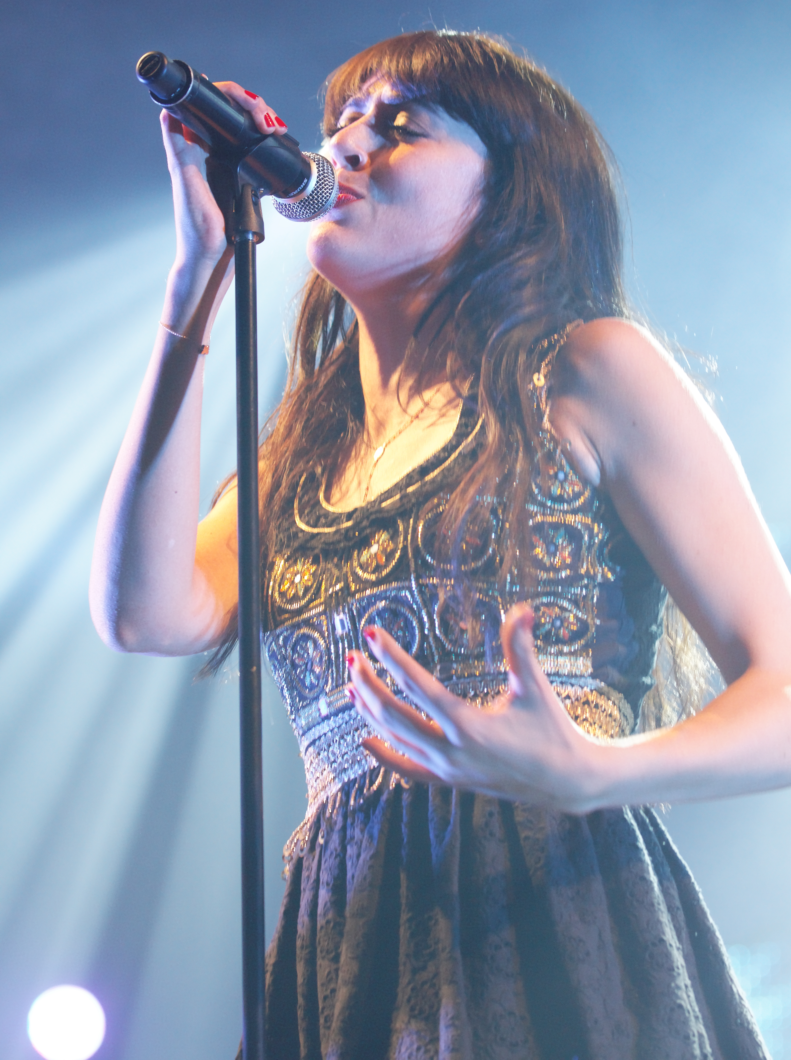 Nolwenn Leroy en concert le 22 juillet lors du festival de Cornouaille 2011.